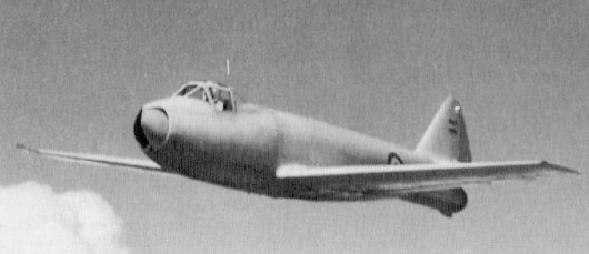 Pulqui I. Military jet plane. 1951